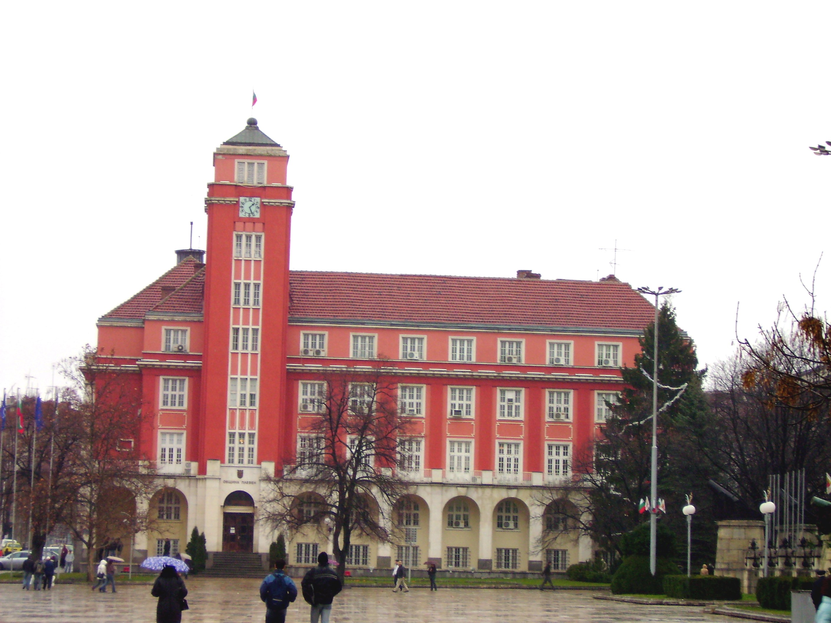 Община / Town hall